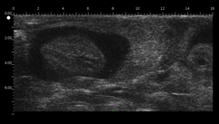 Echo